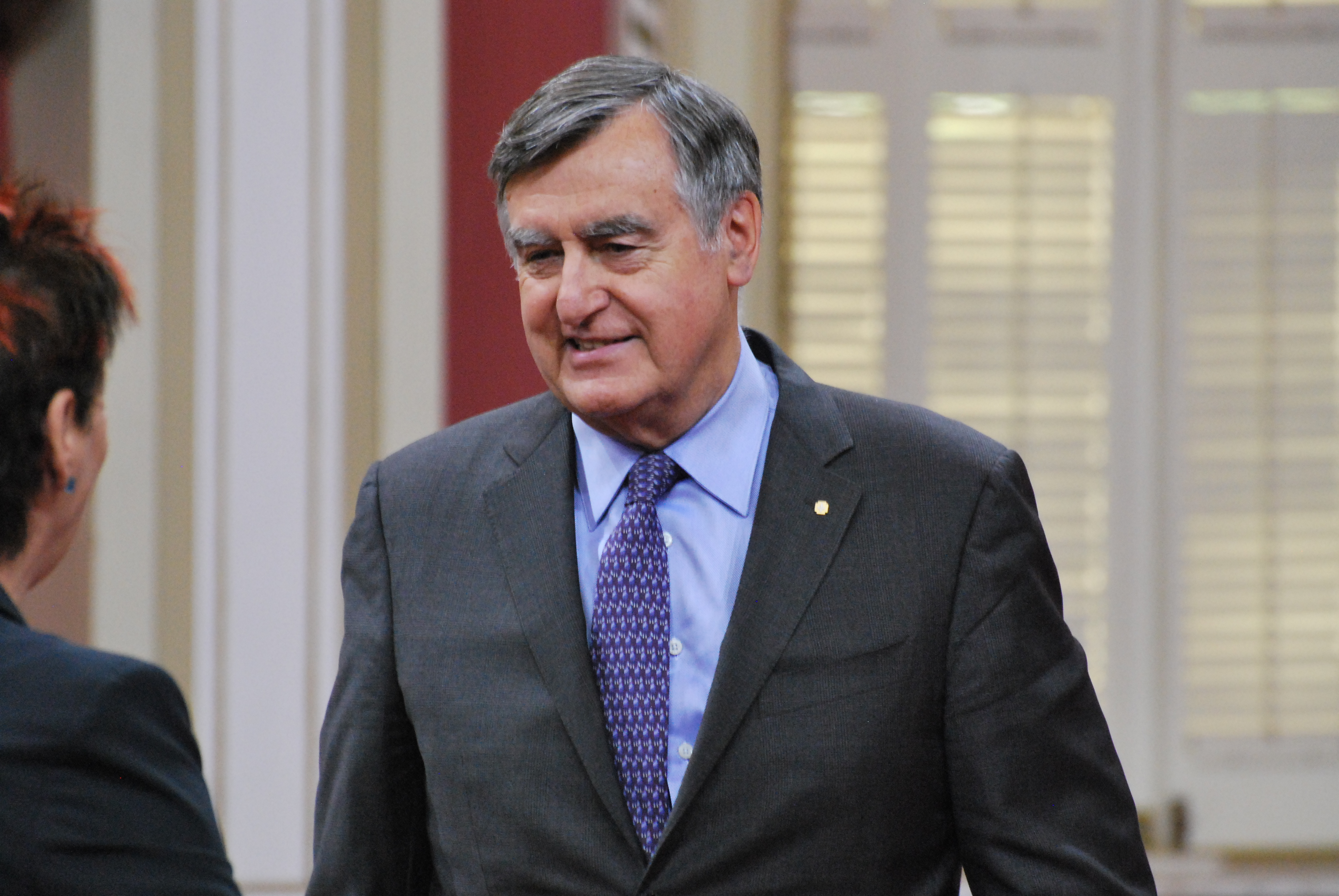 Cérémonie de remise de l'ordre national du Québec 2013. Lucien Bouchard